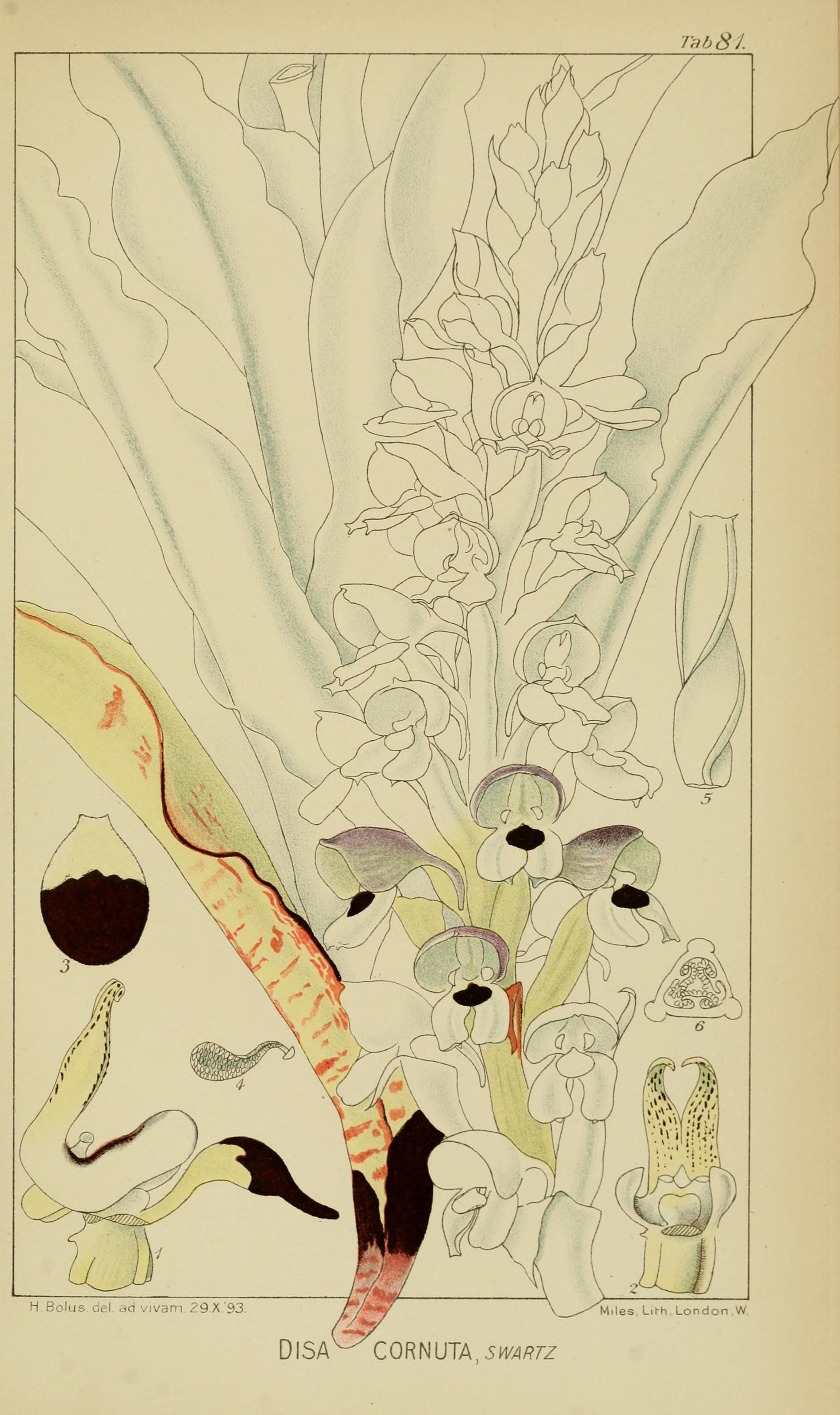 Tab 8 1 H Bolus eel- ad vivam 29 X '93 Miles Lit-h London W DISA^^CORNUTA, 5W/^/?7Z